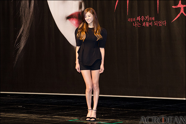 JTBC 일일드라마 ‘가시꽃’ 제작발표회